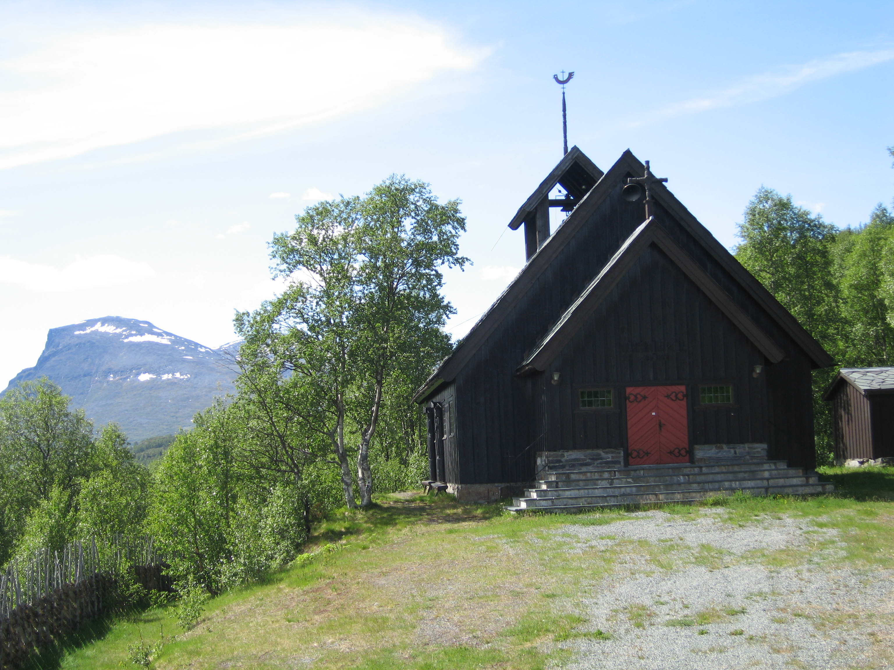 Lykkja kapell er en langkirke fra 1961 i Hemsedal kommune, Buskerud fylke, Norge.